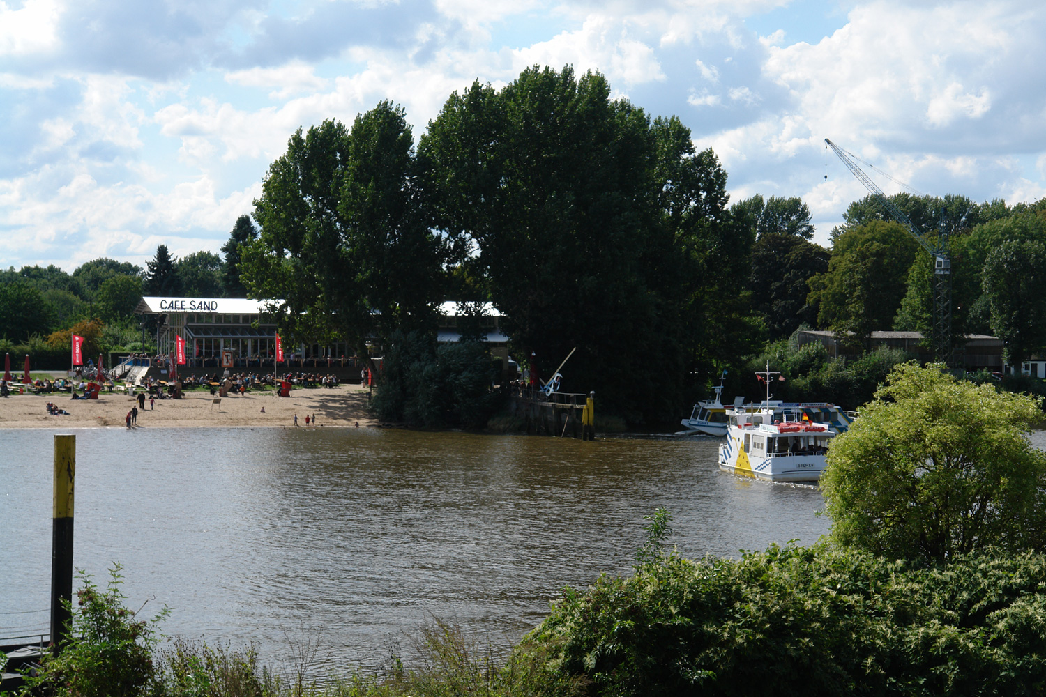 Blick vom Weserufer Osterdeich auf Cafe Sand und Fähre Hal över